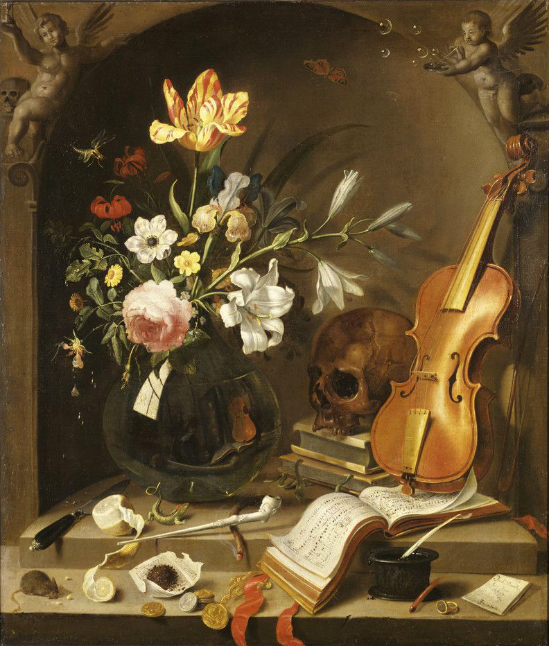 Vanitas